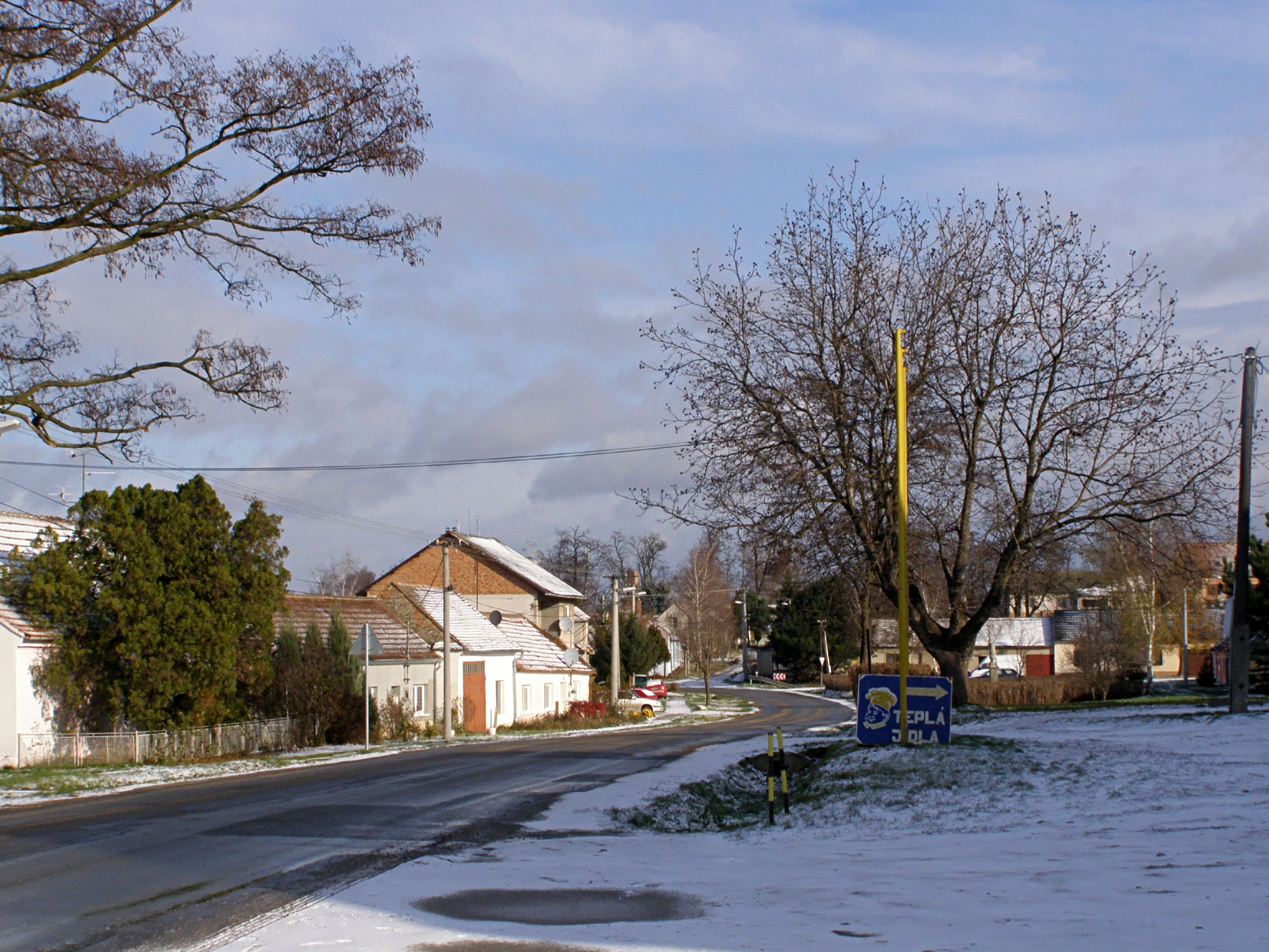 Brod nad Dyjí